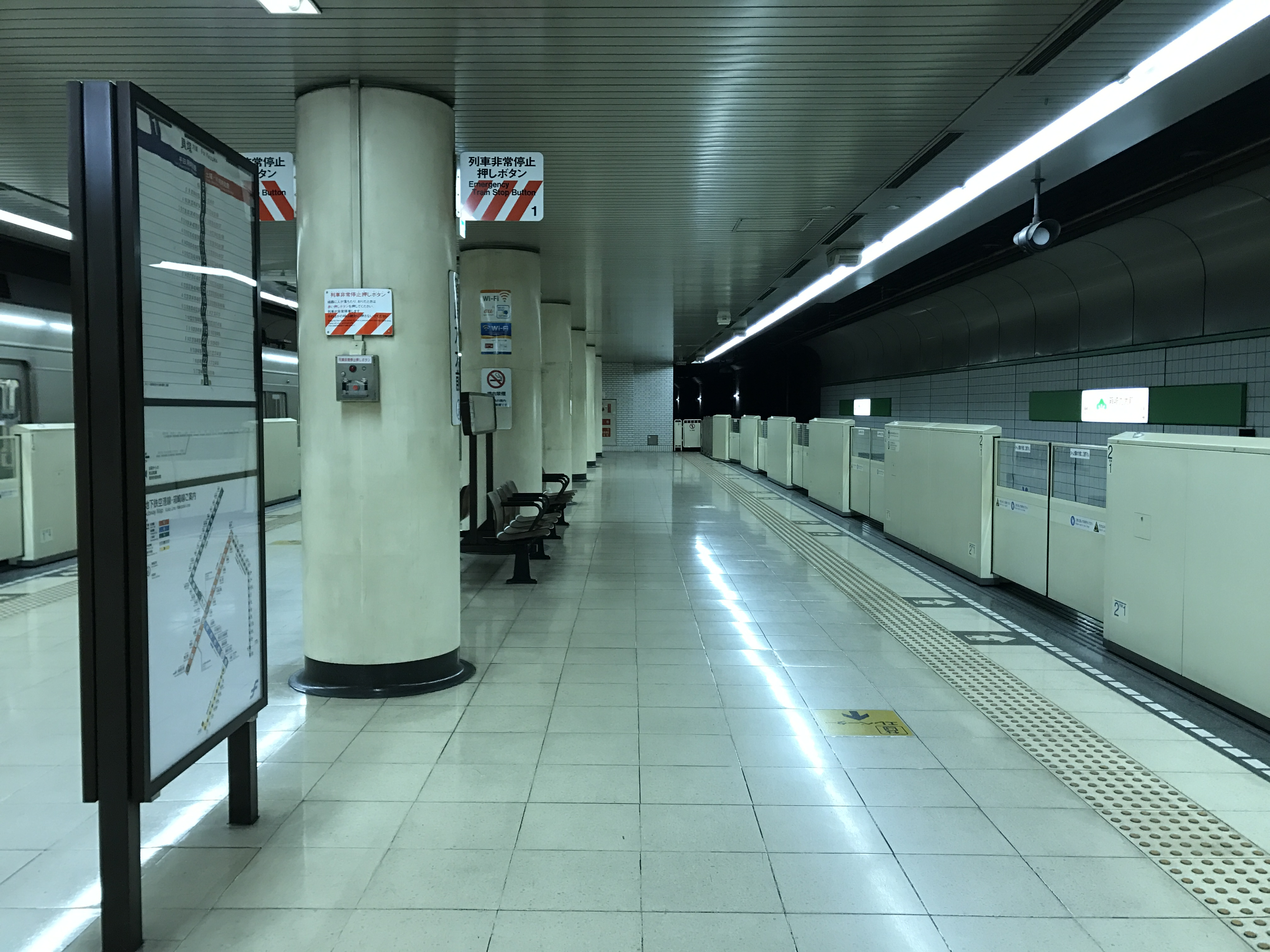 箱崎九大前駅のホーム